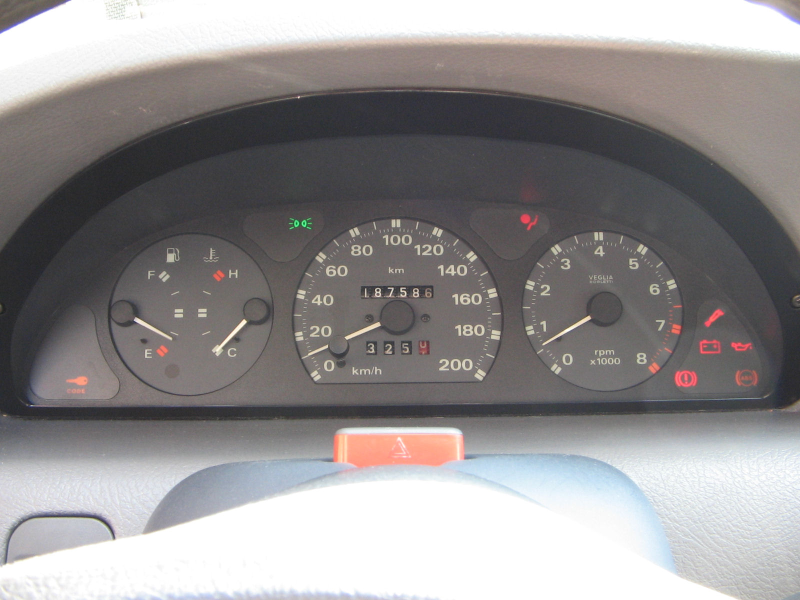 Kombiinstrument eines '95er Fiat Punto HSD mit leuchtenden Kontrollleuchten für Wegfahrsperre, Licht, Airbag, Einspritzanlage, Generator, Öldruck, Handbremse, ABS